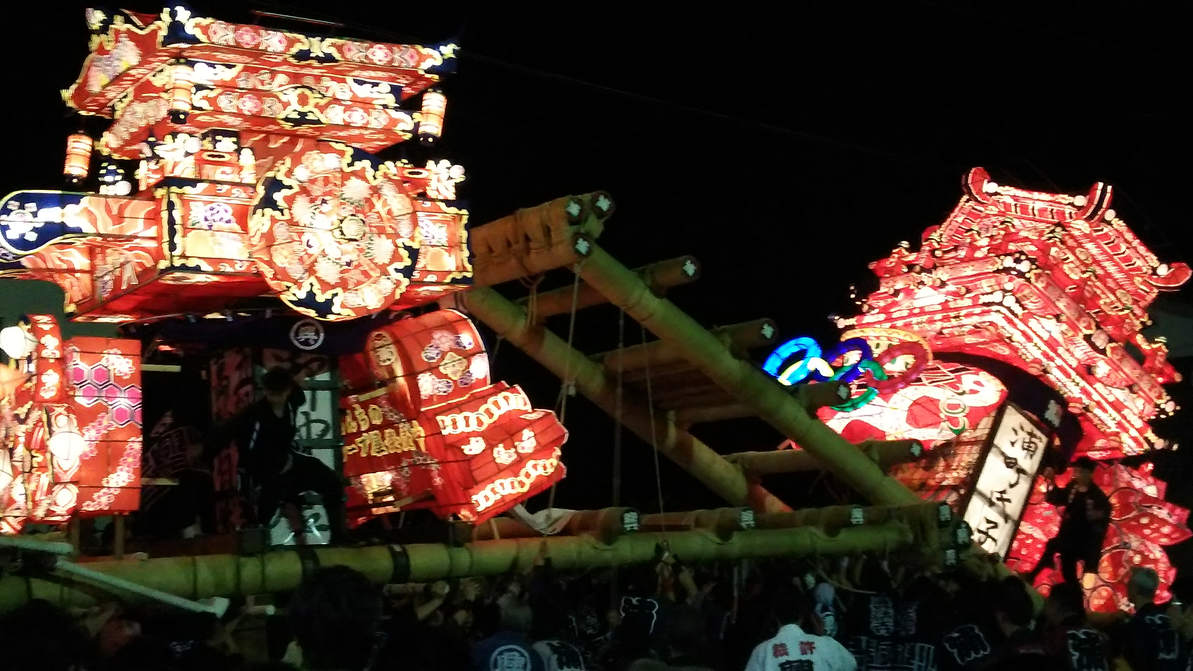 津沢夜高あんどん祭では二日間とも各町の大行燈の激しいぶつかり合いの喧嘩が繰り広げられる。写真は2016年の興法寺対浦町戦。